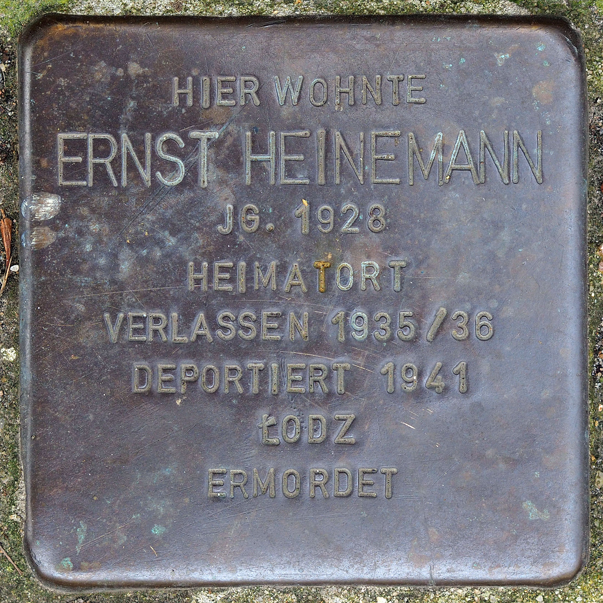 Stolpersteine GV: Heinemann, Ernst